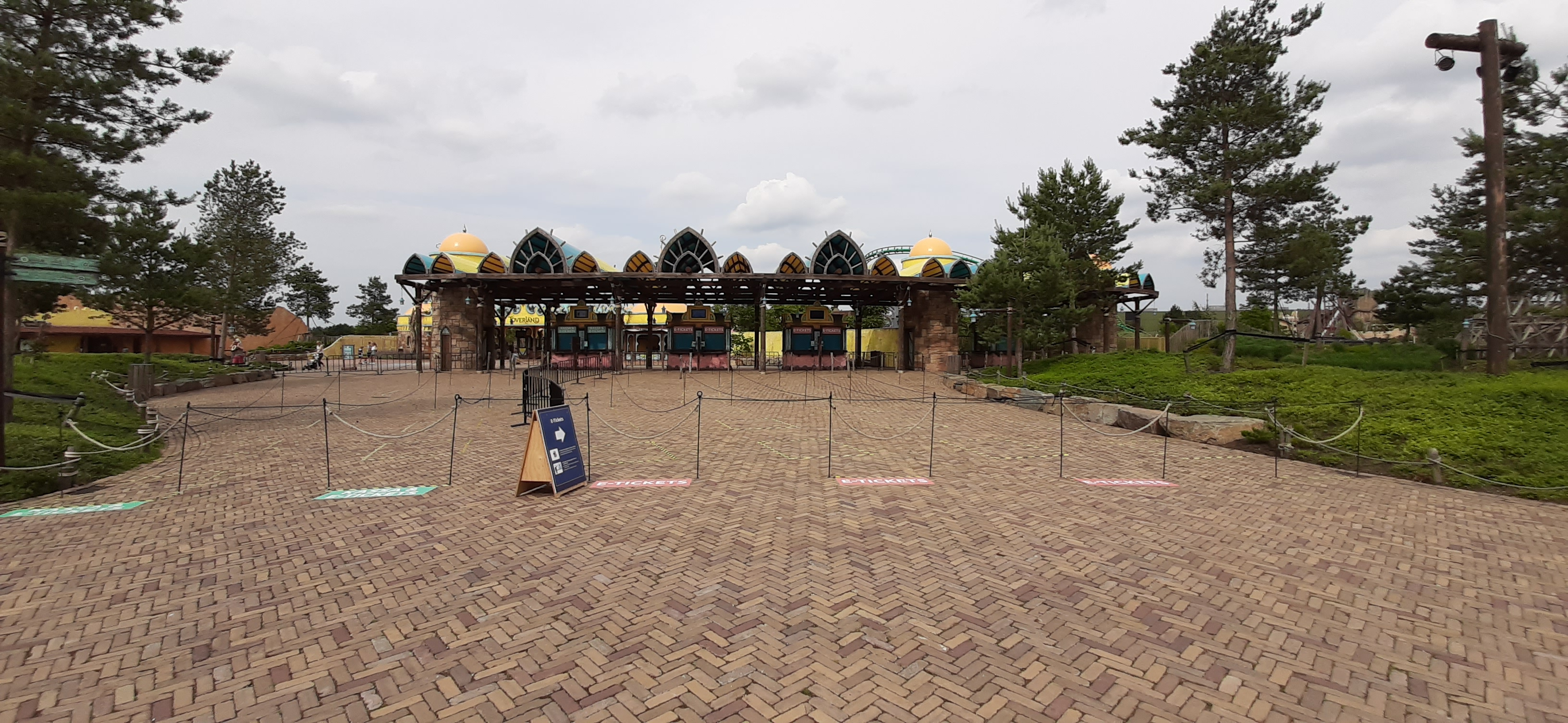 Attractiepark Toverland tijdens de coronacrisis. Speciaal aangepaste wachtrijen bij de entree en diverse (waarschuwing)stickers op de grond.